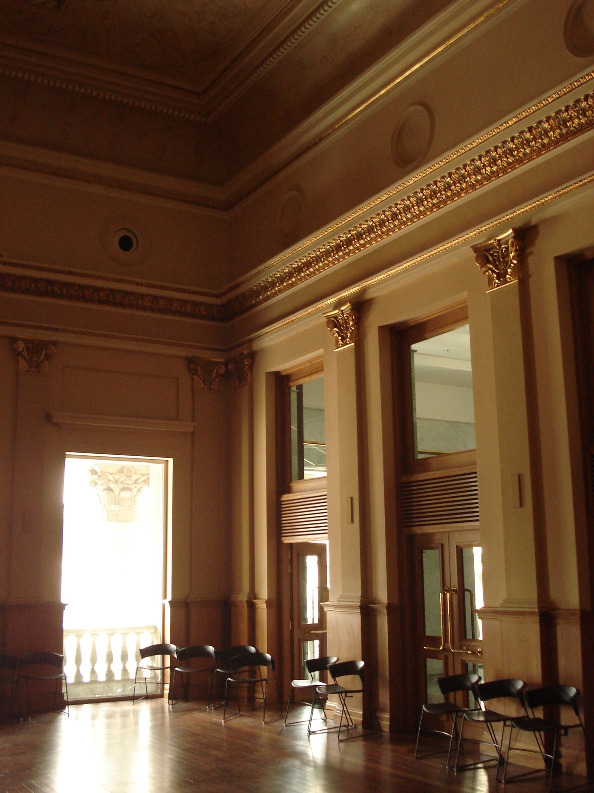 Teatro Solis, Montevidéu, Uruguai.